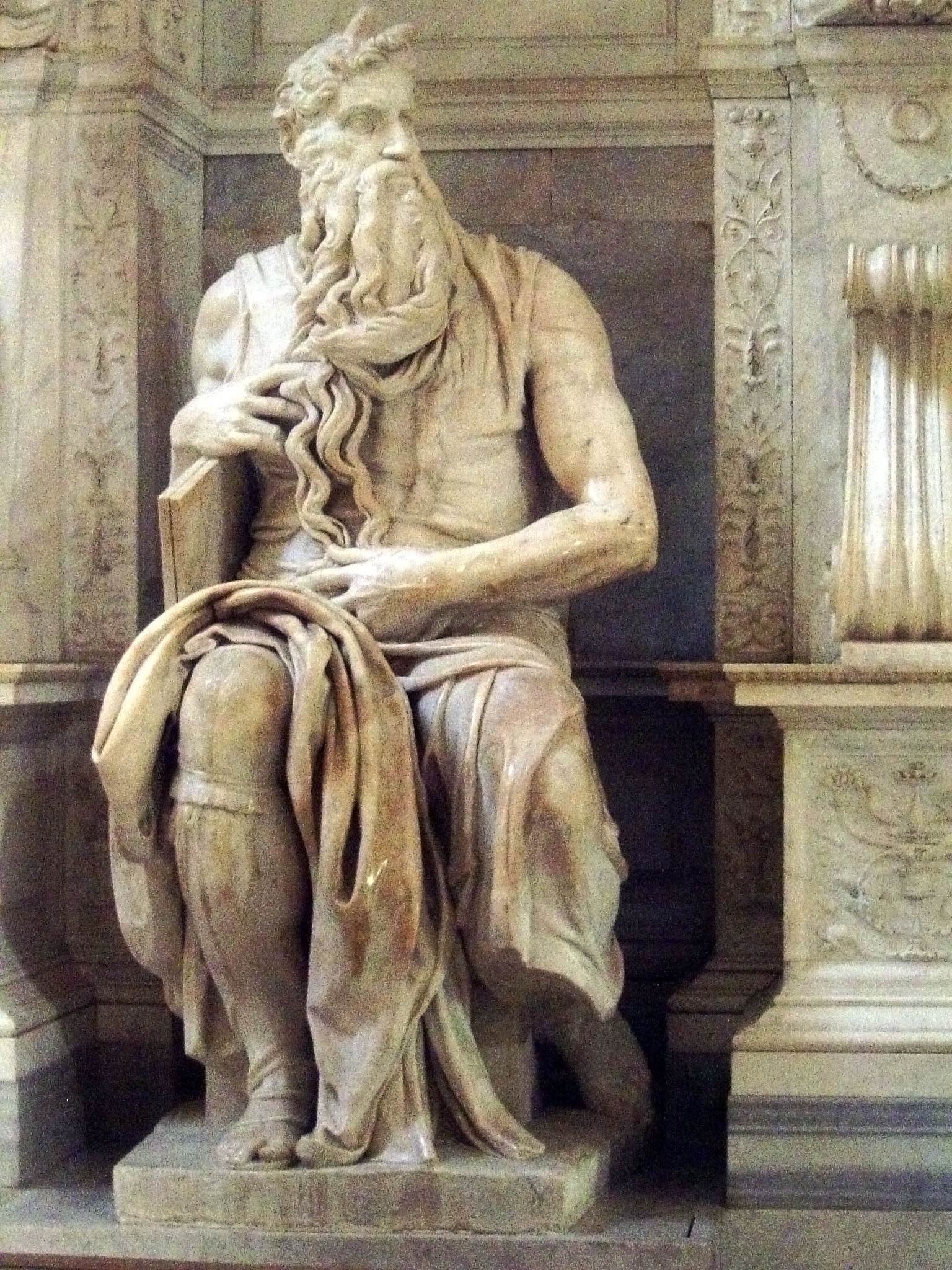 Roma, Italia